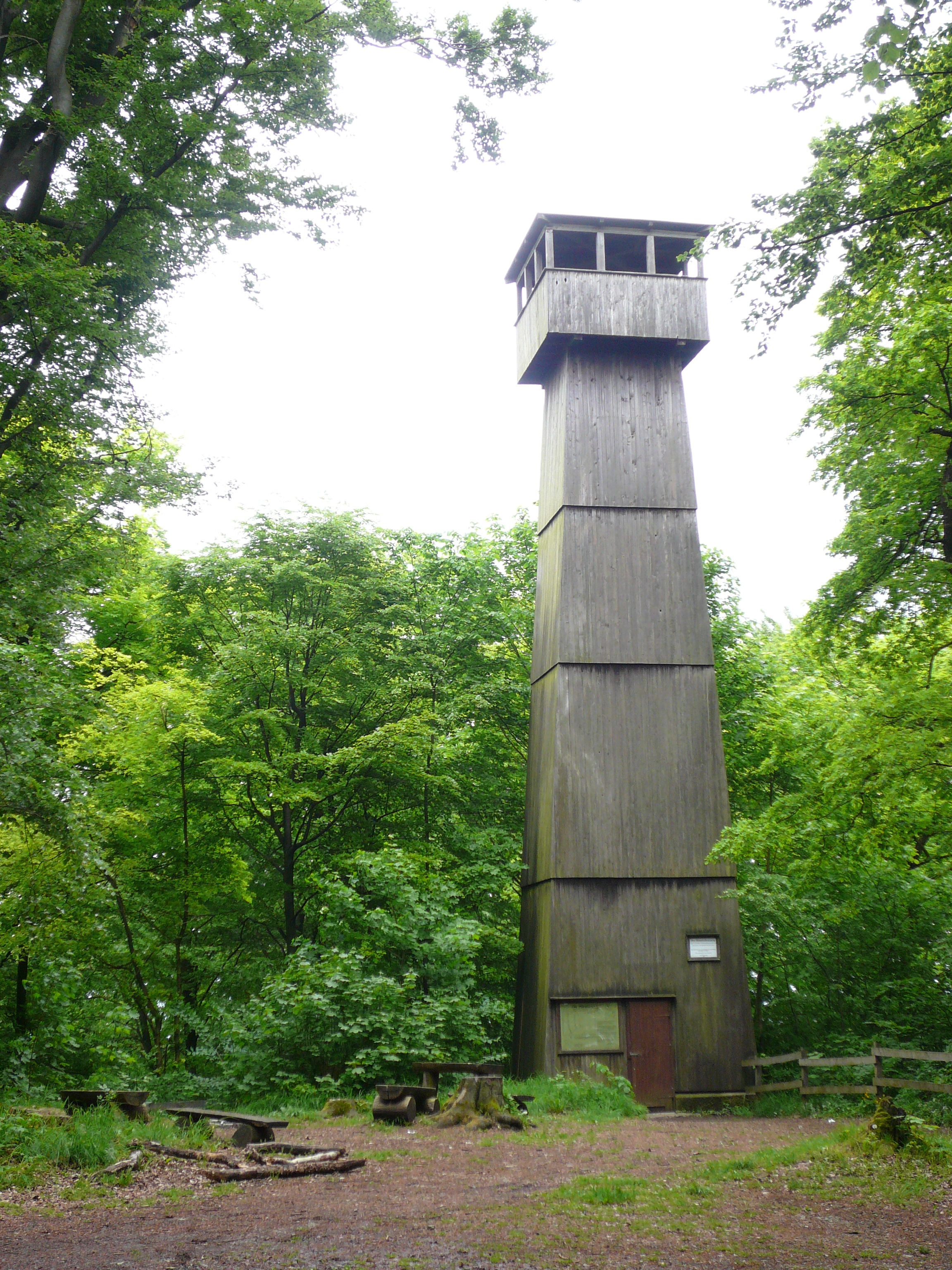 Aussichtsturm auf dem Bergsporn des Hünstollen, Göttinger Wald